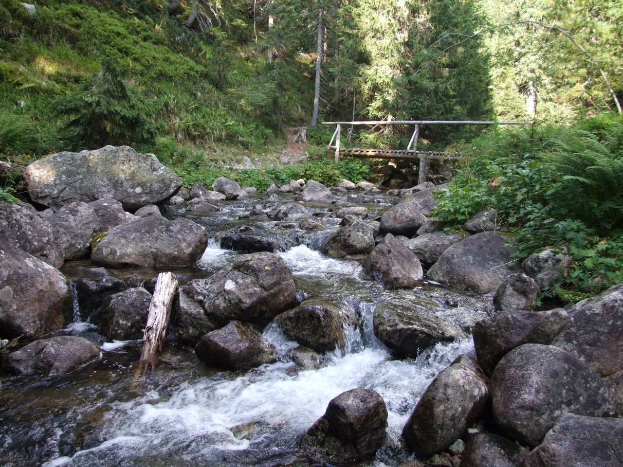 Ciemnosmreczyński Potok (Temnosmrečinský potok)